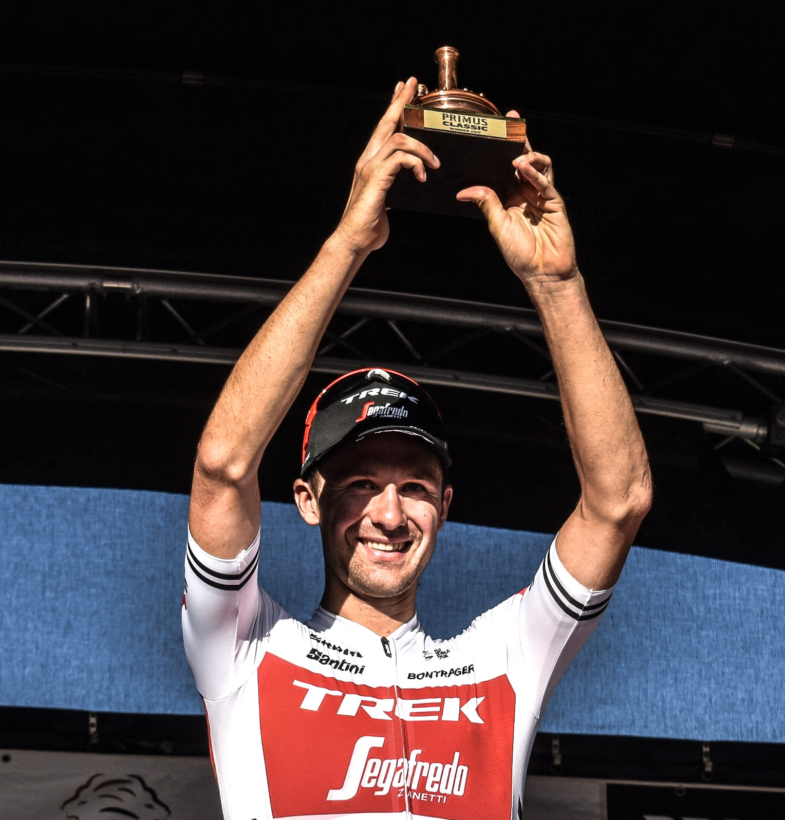 Edward theuns met de prijs